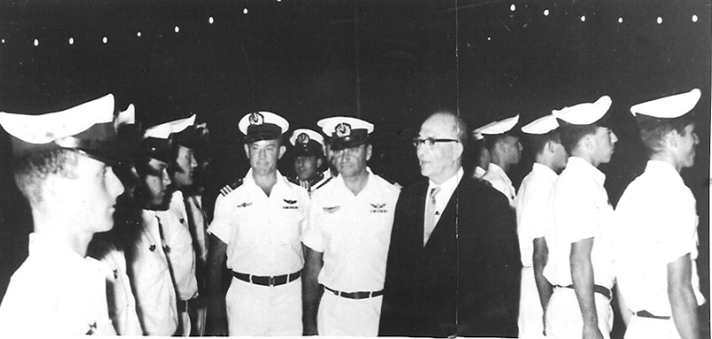 ראש הממשלה לוי אשכול סוקר את מסיימי קורס הלוחםים צוללים. בליווי מפקד חיל הים יוחאי בן נון ומפקד שייטת 13 אהרון בן יוסף קיצוני משמאל בפרופיל עמי איילון..